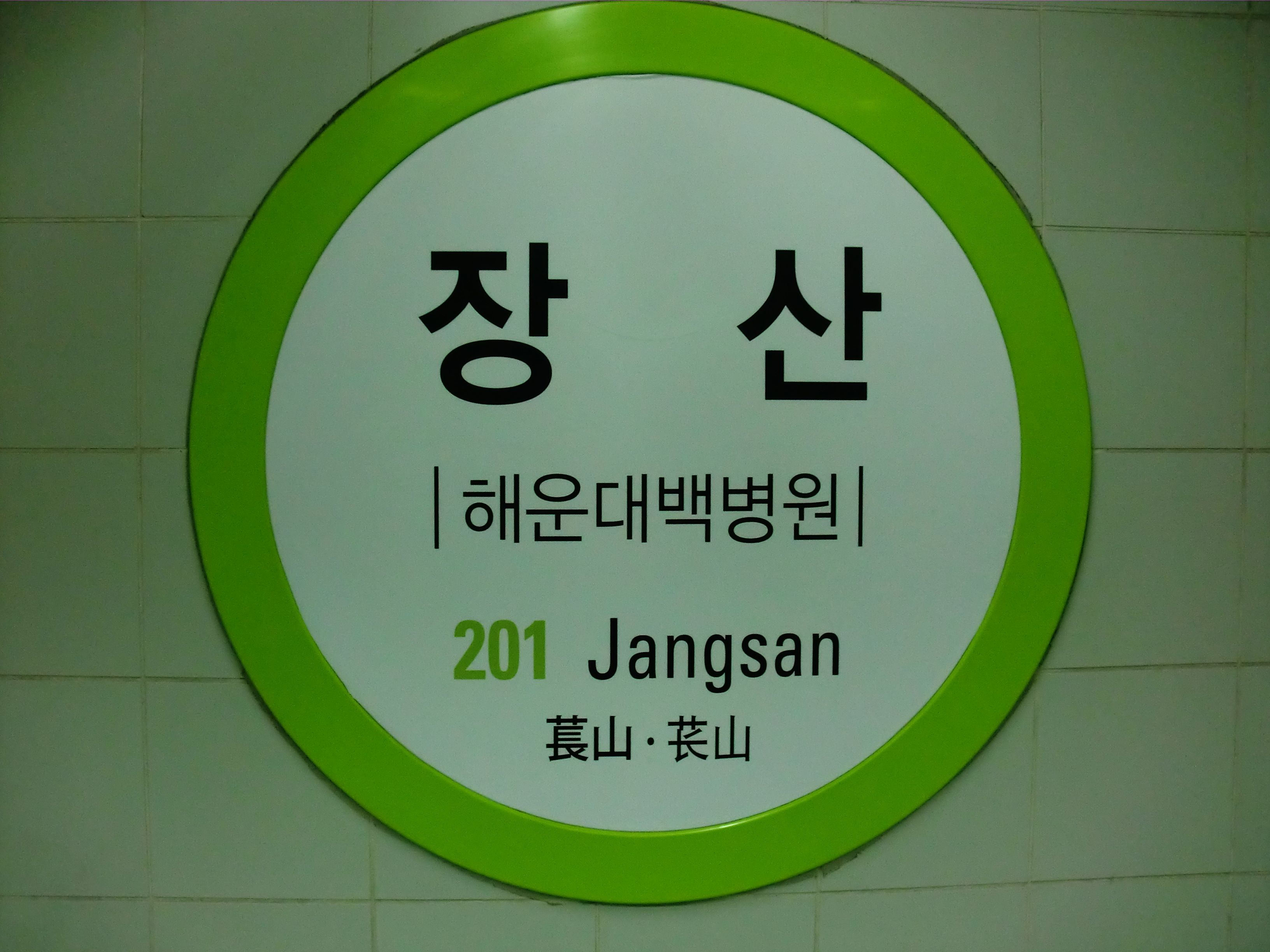 부산도시철도2호선 장산역의 역명판